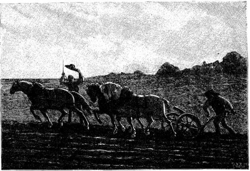 "Un jour qu'il était à charruer", illustration des Contes de terre et de mer de Paul Sébillot, 1883, p. 86